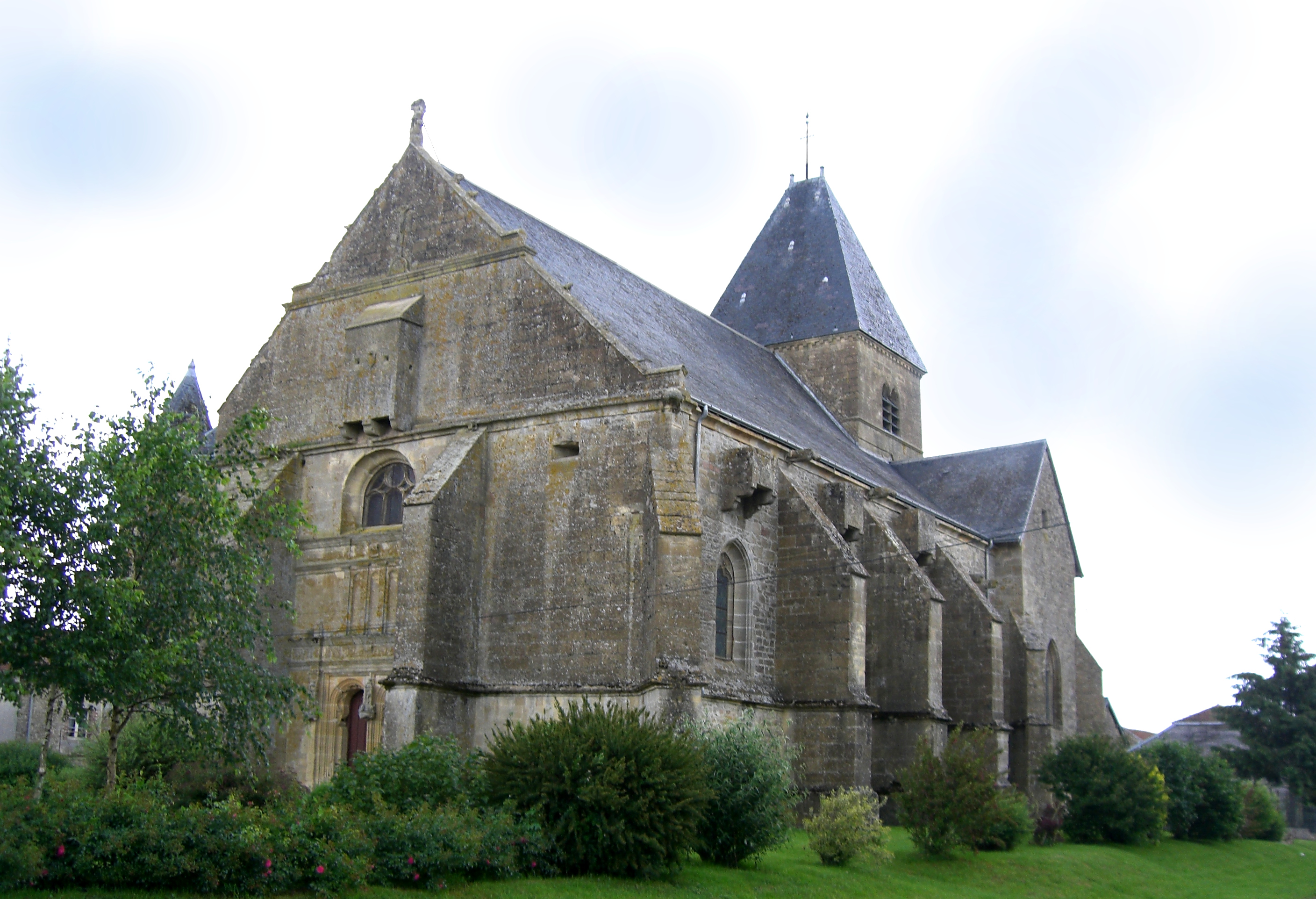 Eglise de Verpel (Ardennes, France)